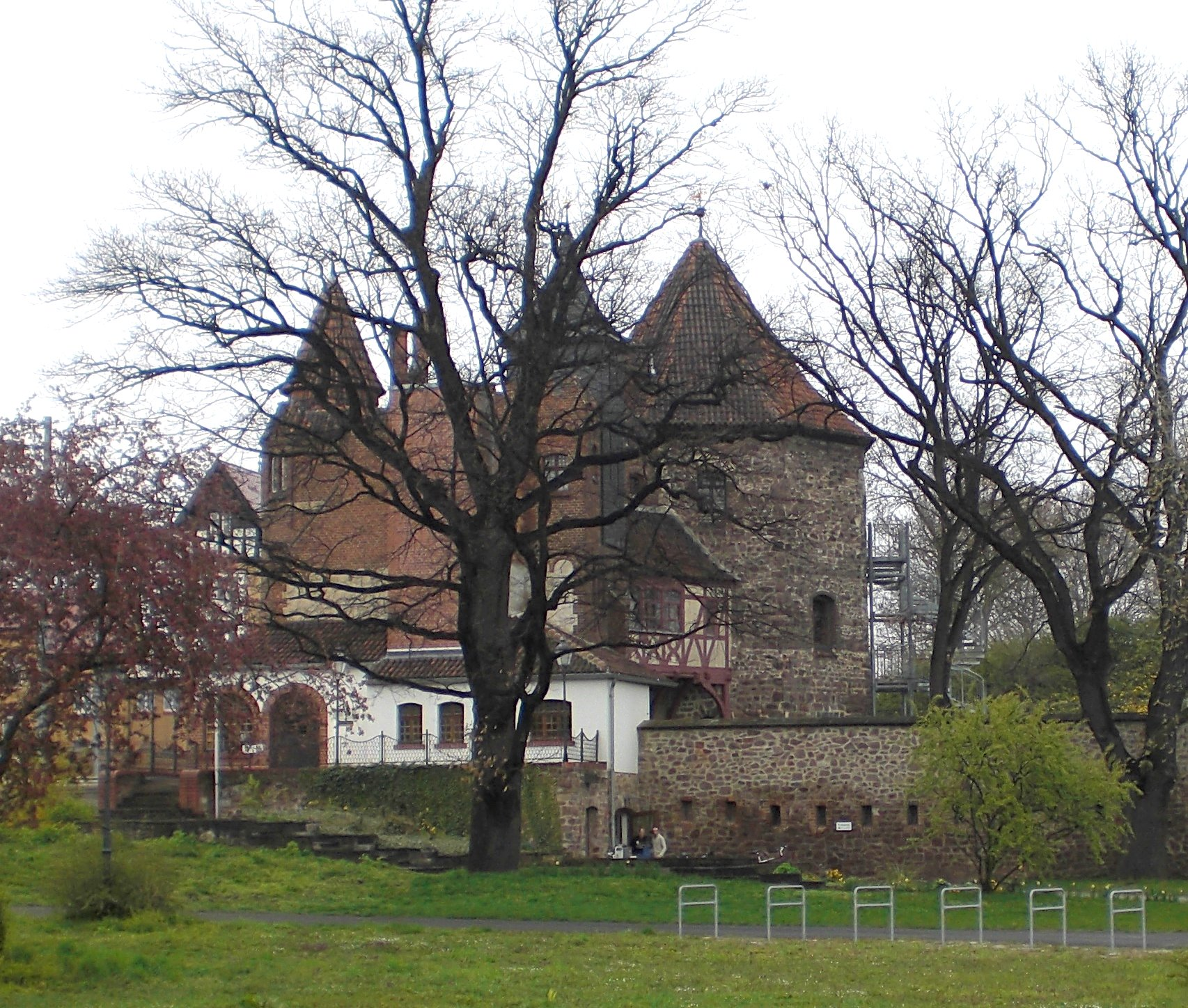 Wehrturm Lukasklause in Magdeburg, Ansicht von Süden